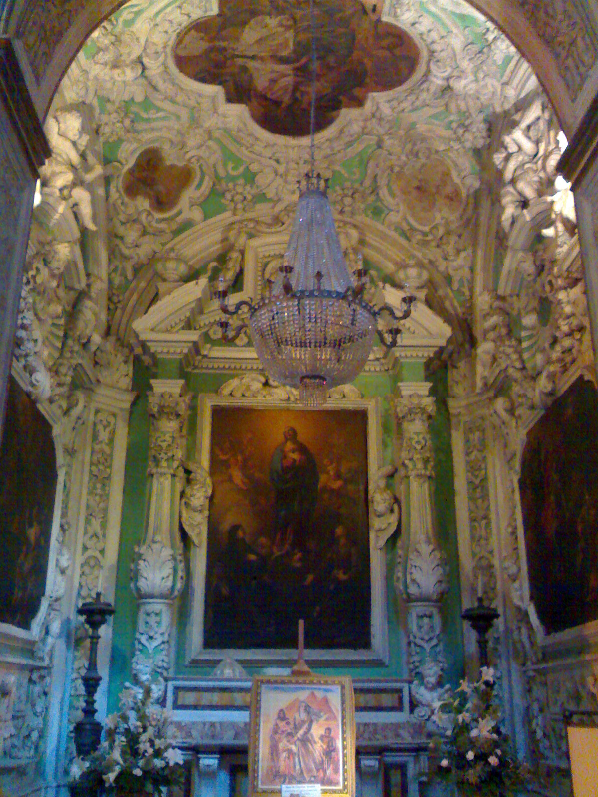 Cappella della Chiesa del Gesù delle Monache (Napoli)